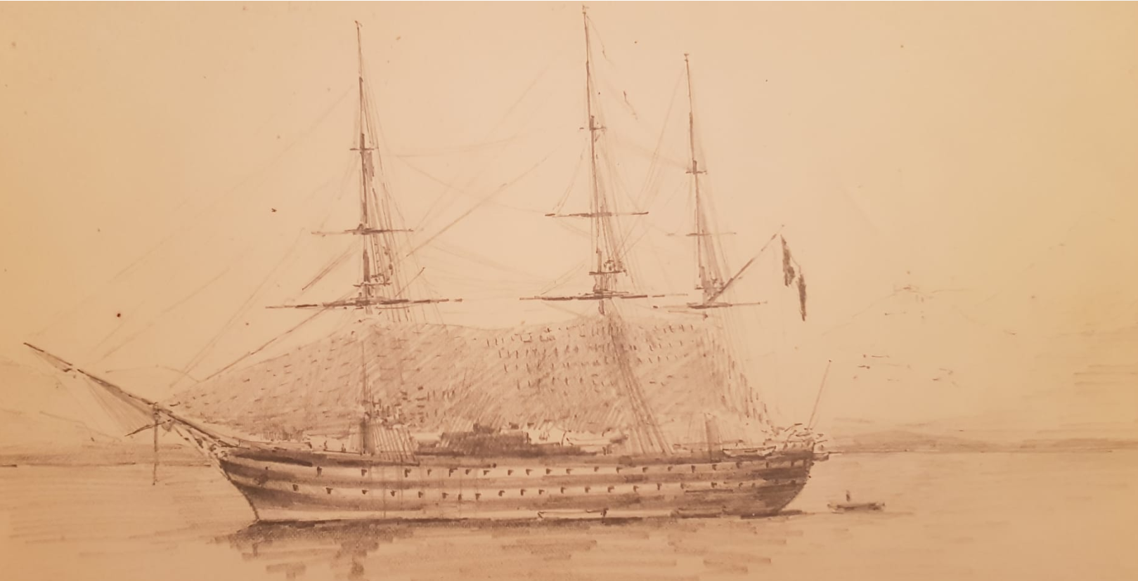 L'Iphigénie au mouillage à Gibraltar - dessinée par Henri du Couëdic de Kérérant, 1886.